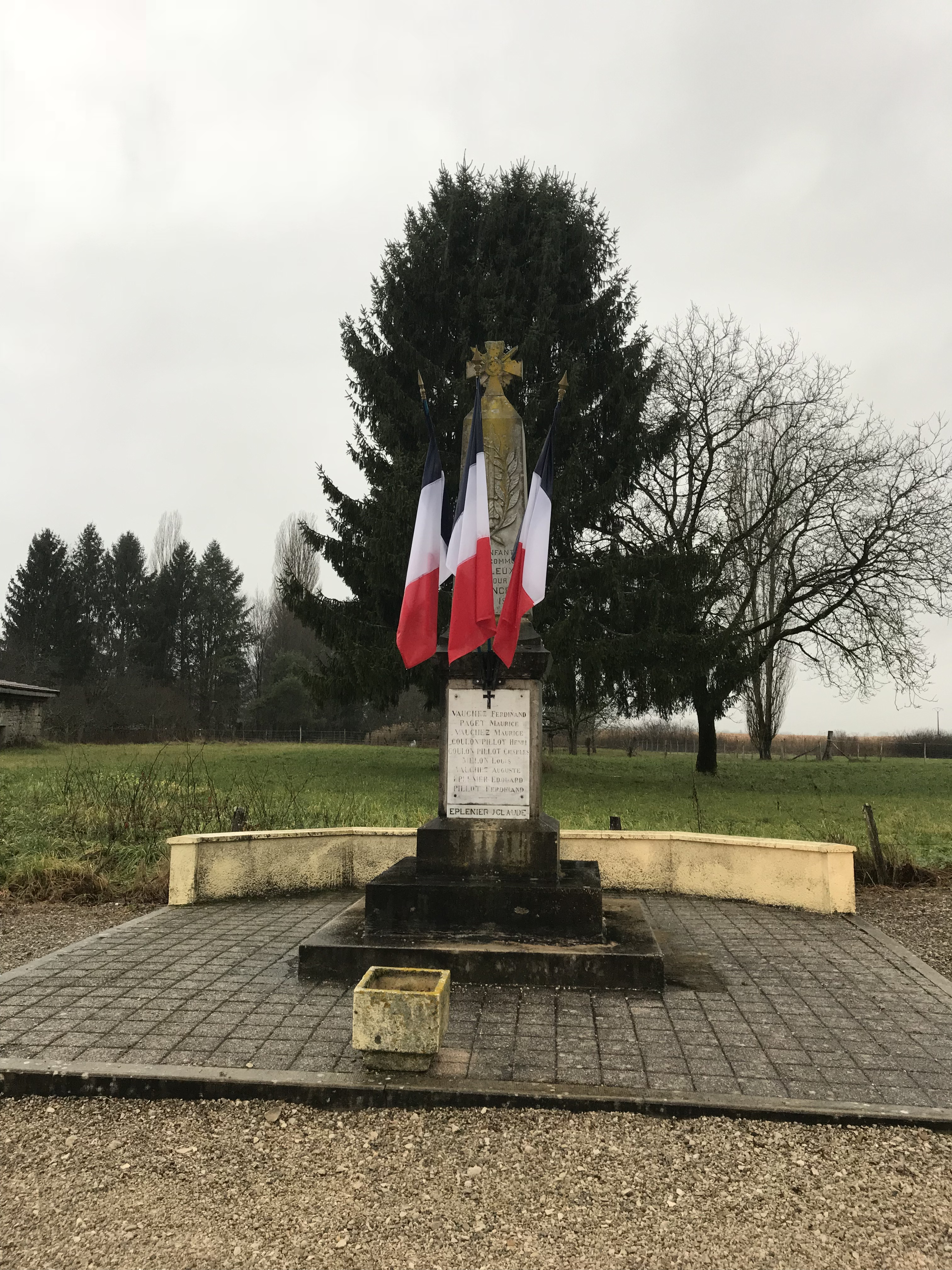 Image de Écleux (Jura, France) en janvier 2018.